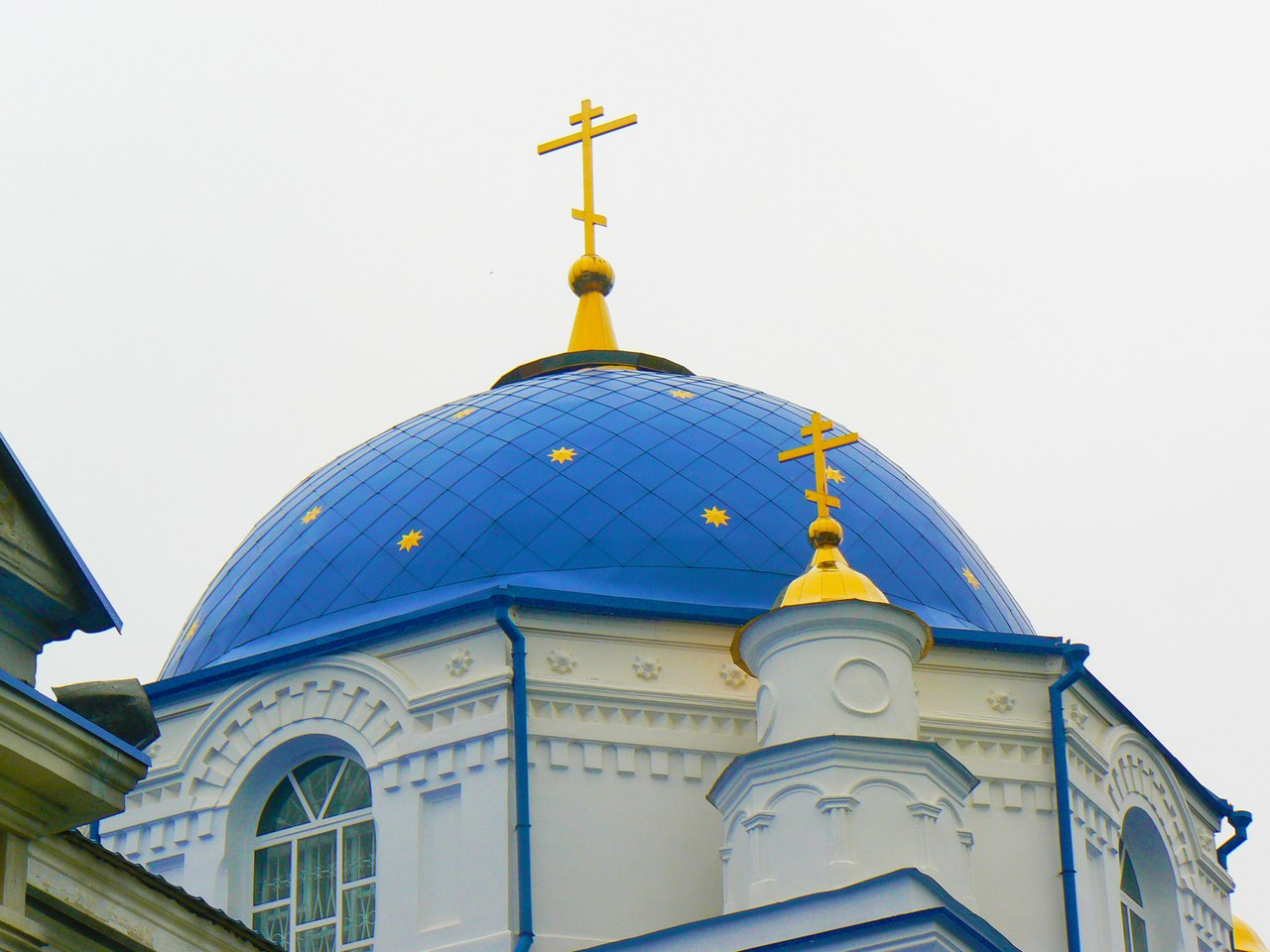 г. Верхний Тагил, ул. Спорта, 46